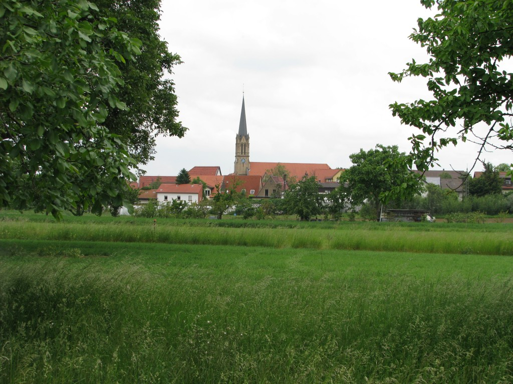 Brühl